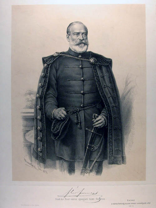 Flór Ferenc (1809–1871) orvos, orvosi szakíró, honvéd alezredes, az 1848–49-es szabadságharcban a hadügyminisztérium egészségügyi osztályának vezetője, a Magyar Tudományos Akadémia levelező tagja. Marastoni József litográfiája